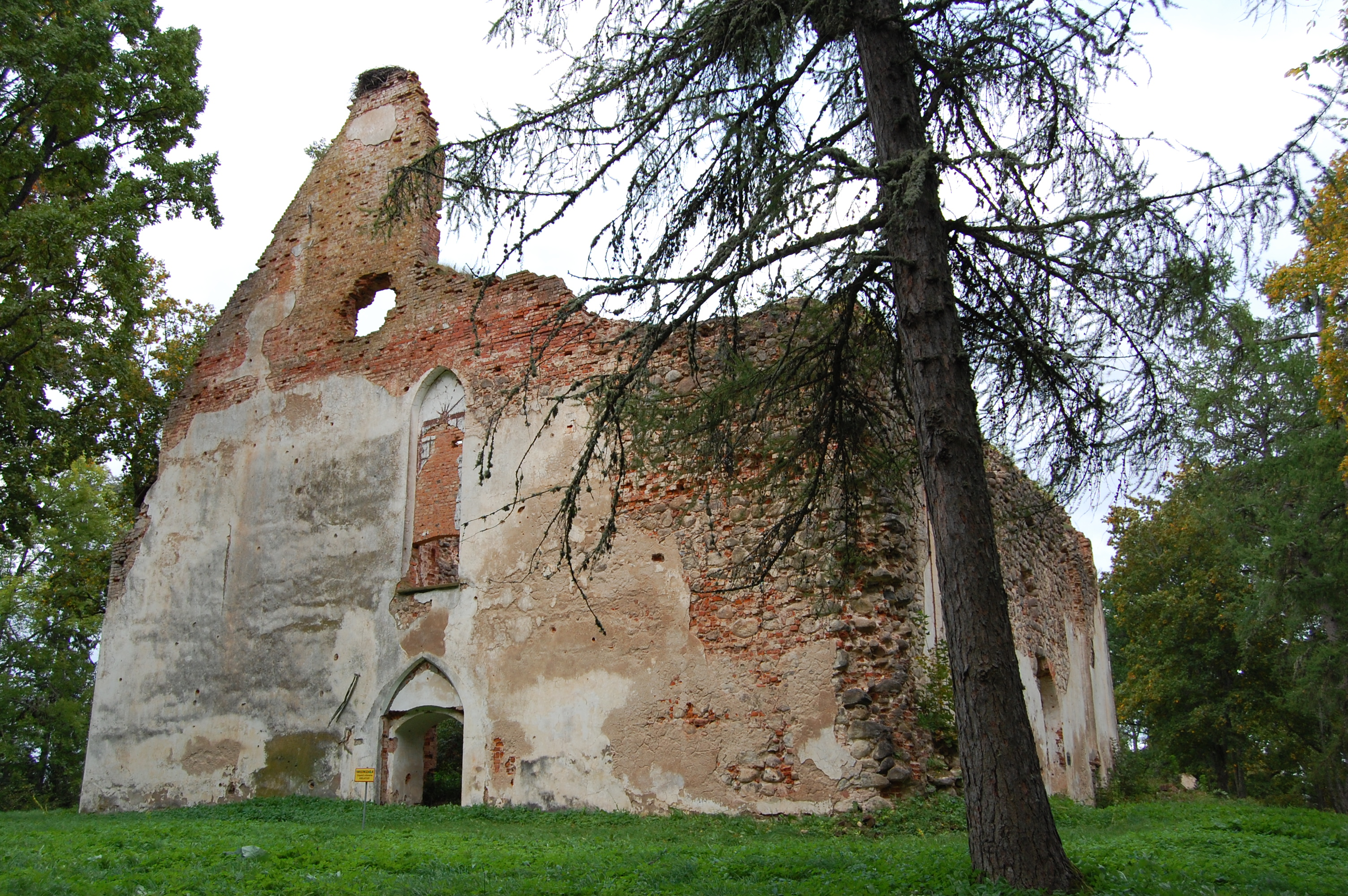 Asukoht Kirikuküla